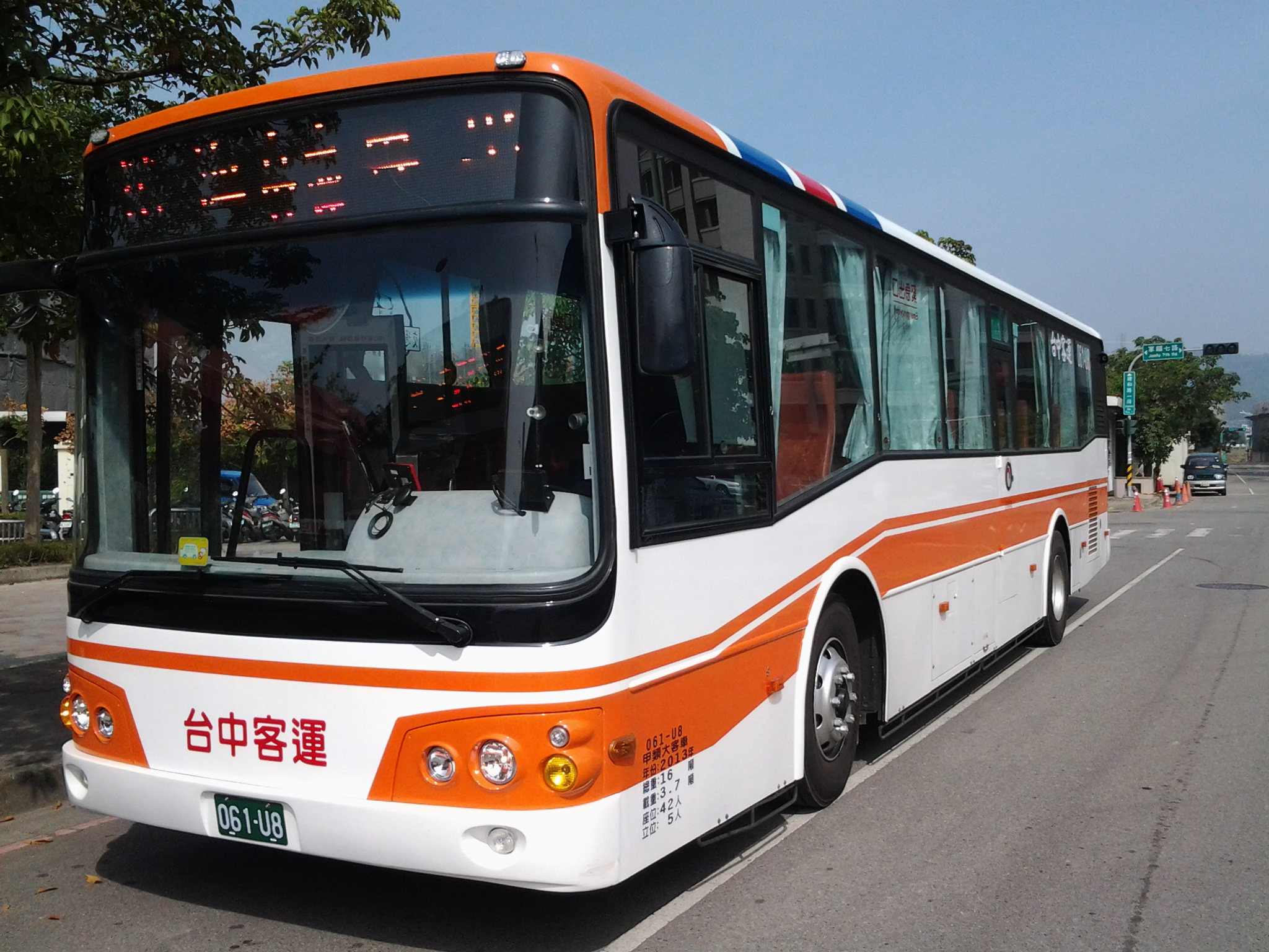 2013〈2013〉 DAEWOO BC211MA（固亞）